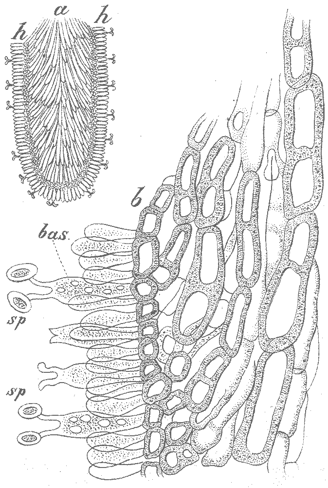 Agaricus bisporus hymenium, illustration from von Schubert`s «Naturgeschichte des Pflanzenreichs»